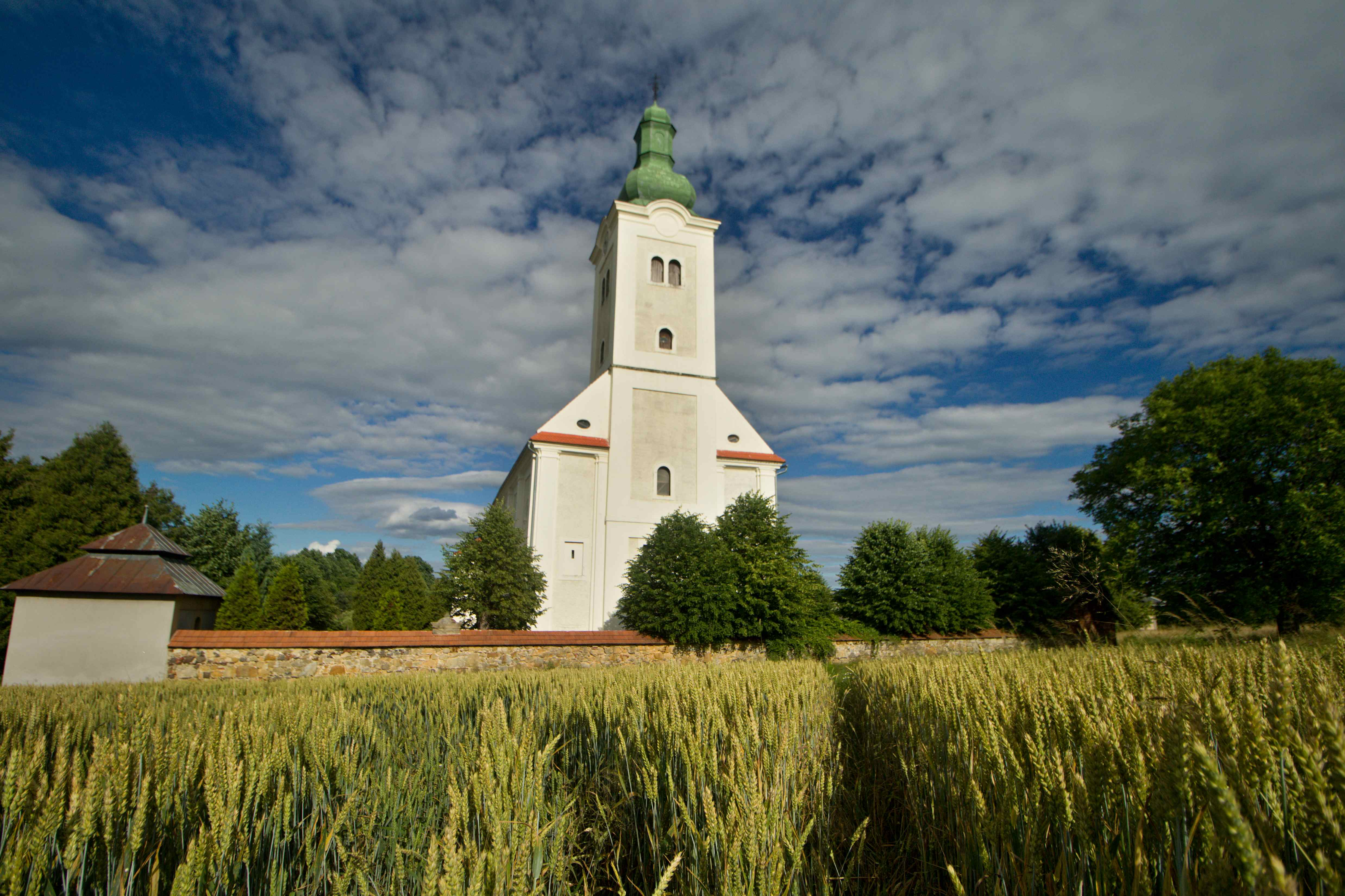 Dubnice, okres Česká Lípa, kostel Narození Panny Marie